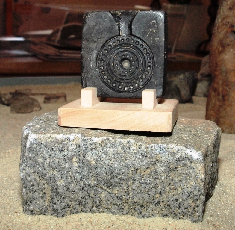 Das einzige bisher gefundene Model für Schmuck aus der Bronzezeit. Material: Sandstein, Fundort Österreich, Niederösterreich, Hollabrunn, Zellerndorf, Platt, Brunnfeld